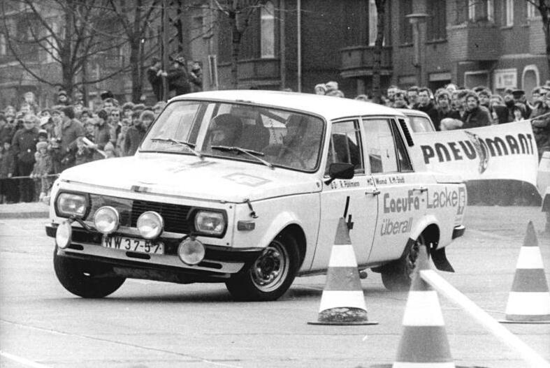 Berlin, 23. Pneumant-Ralley, Auftaktrennen ADN-ZB Mittelstädt 5.3.83 Berlin: 23. Pneumant-Ralley-Auftakt für 1. Lauf zur DDR-Meisterschaft im Tourenwagensport war der "Berlin-Slalom" auf dem Parkplatz vor der Werner Seelenbinder-Halle. Bevor die Besatzungen auf die Strecke gingen, mußten 48 Hindernisse auf einer Slalomstrecke (hier die Wartburg-Besatzung Pöhlmann-Scherbarth vom MC Wismut Karl-Marx-Stadt) überwunden werden. (Siehe auch Foto 1983-0305-10N)